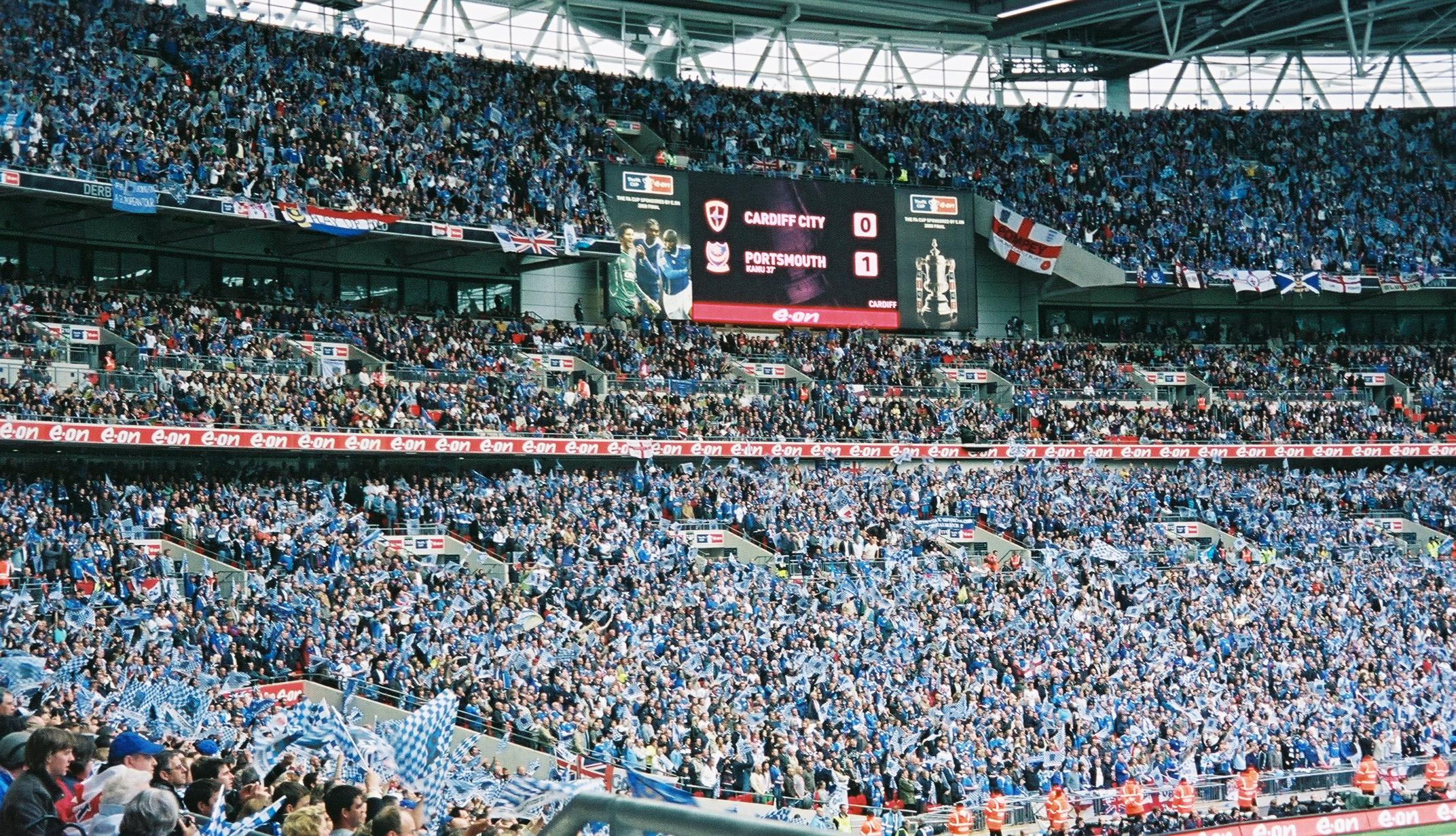 facupfinal2008fulltimescore